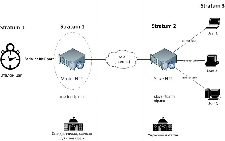 Монгол: Цагийн серверийн зохион байгуулалт